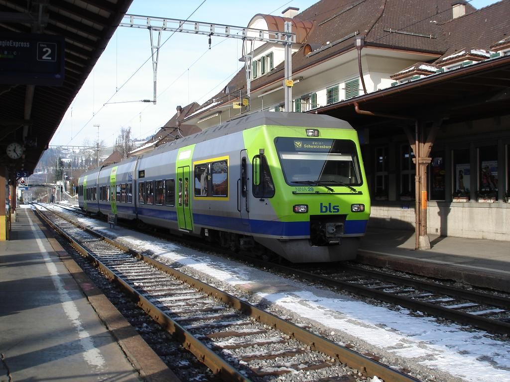 RABe 525 NINA in Langnau